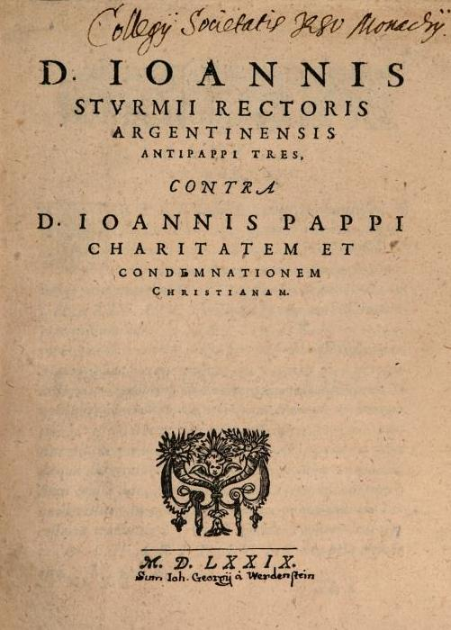 Les Antipappi écrits par Jean Sturm sont de violents pamphlets à l'encontre de Jean Pappus. Ils ont été rédigés entre 1578 et 1581.